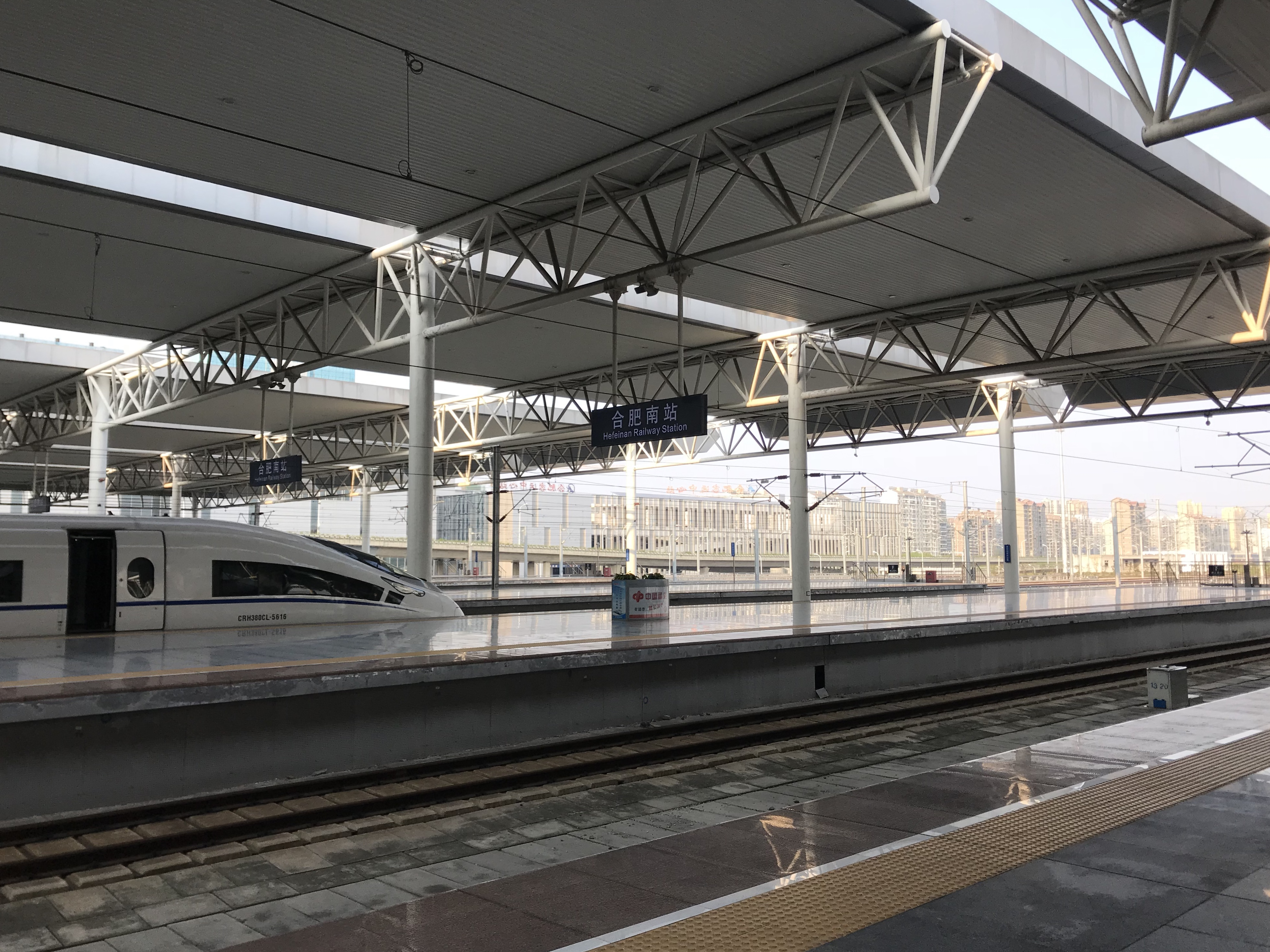 合肥南駅のホーム